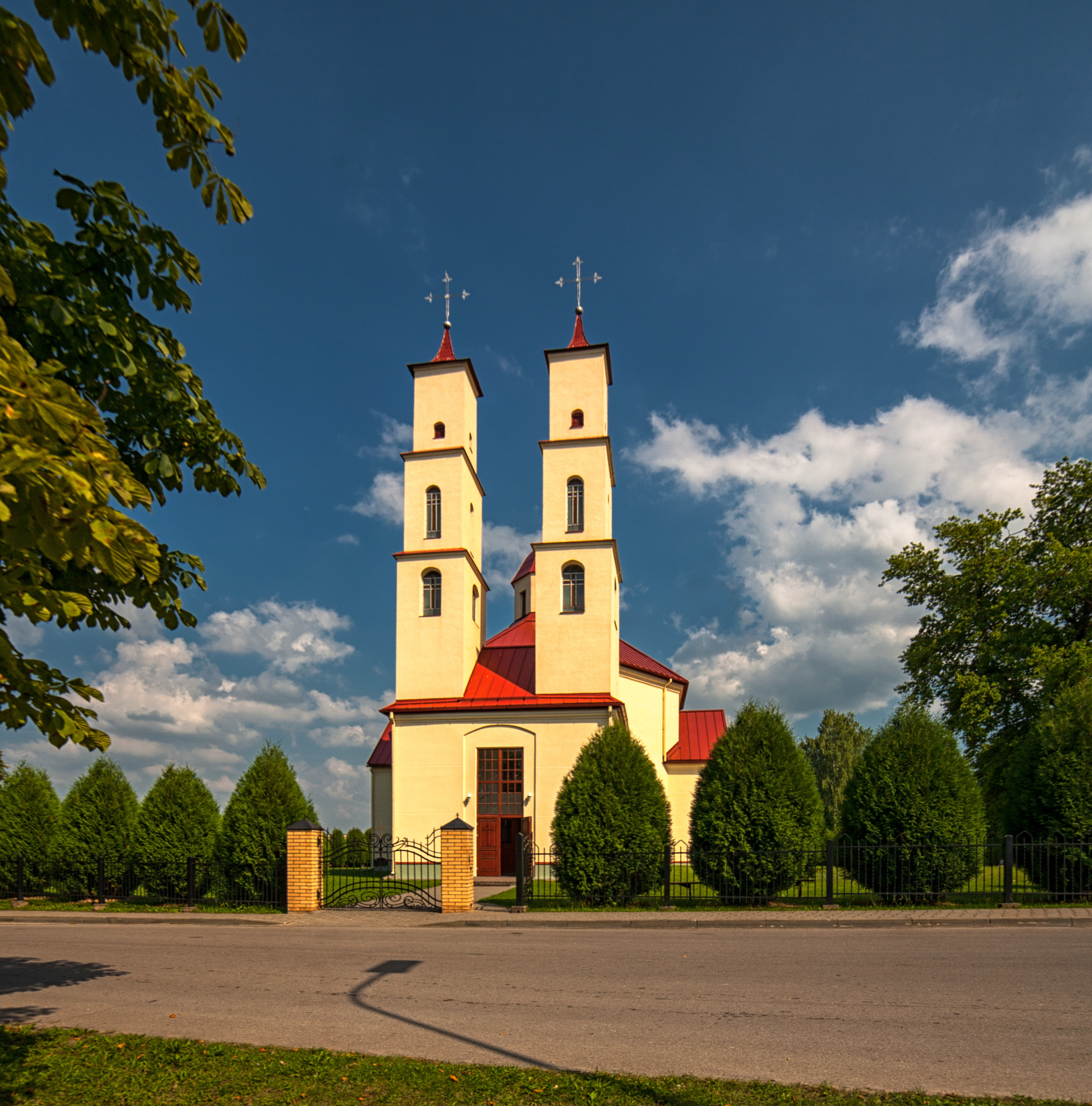 Balvu katoļu baznīca, Balvi, Baznīcas iela 1